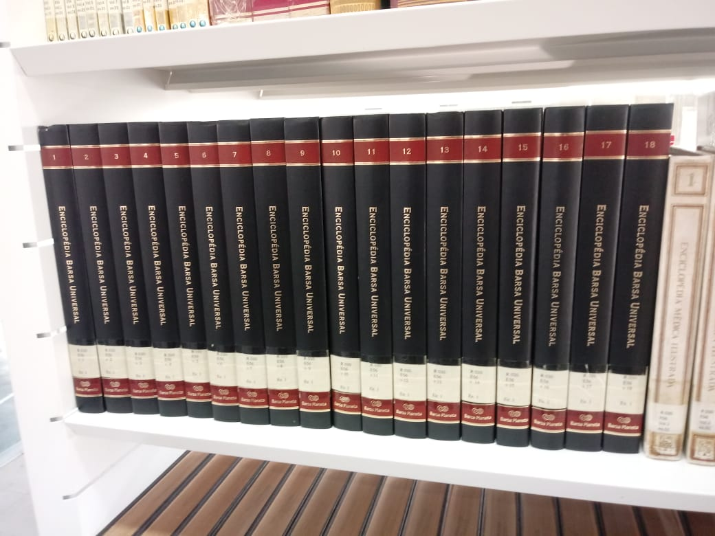 Coleção da Barsa na Biblioteca Municipal Lustosa da Costa, em Sobral, Ceará.